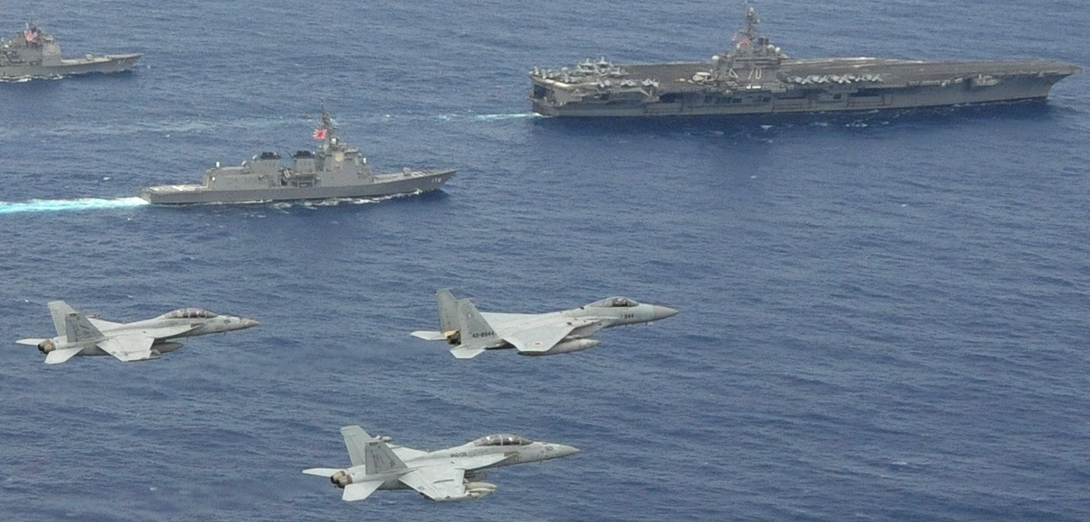 カールビンソン、あしがら(DDG-178)、F-15J、FA-18E